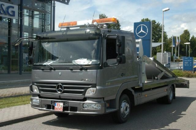 Mercedes-Benz Atego Facelift